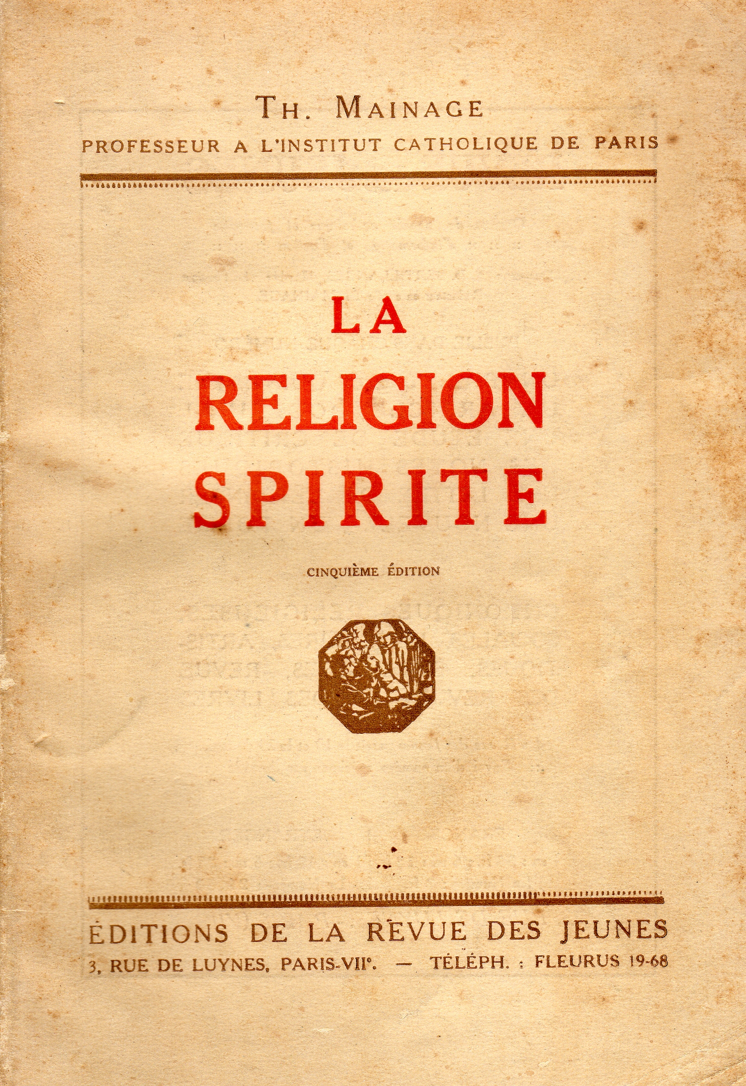 Couverture du livre "La religion spirite". Ouvrage catholique officiel de 1921. Archive org: "La religion spirite" - Mainage, Thomas Lucien, 1878-1931